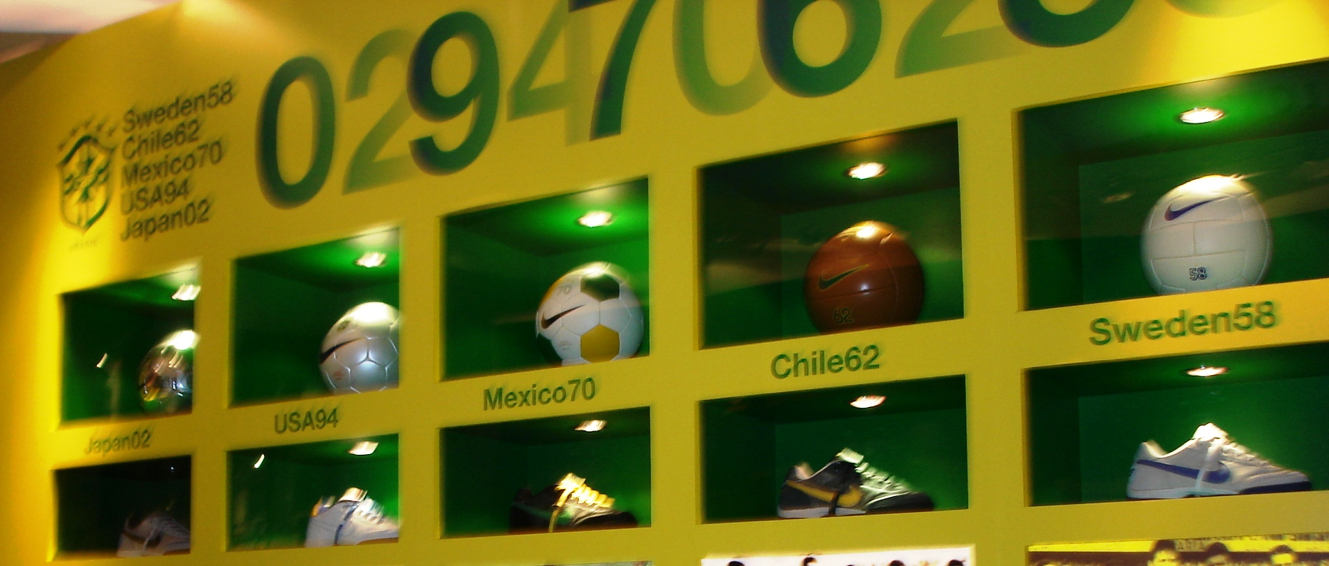 Exposiçǎo alusiva ao pentacampeonato brasileiro de futebol, loja da Nike, Londres essa loja se encontra aqui em recife tambem. na rua padre oiveira n° 654. Proximo a feira da rodinha. Att: éO rafaeL , LapaÐa Cfv... Toic